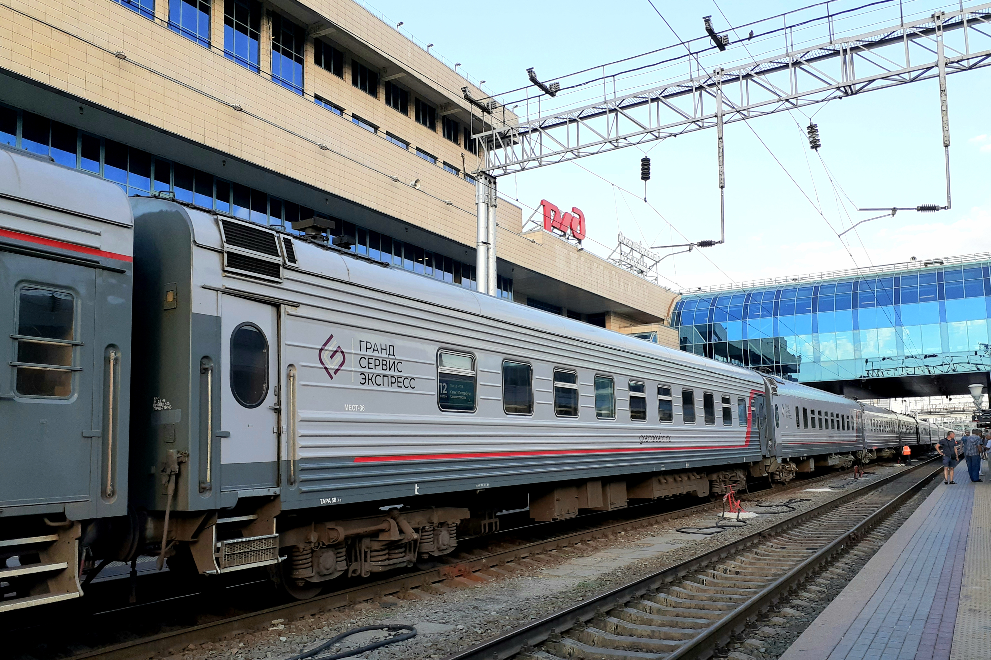 Купейный вагон АО ТК «Гранд Сервис Экспресс» на станции Ростов-Главный Северо-Кавказской железной дороги в составе поезда № 7/8 «Таврия» Санкт-Петербург — Севастополь, 2020 год